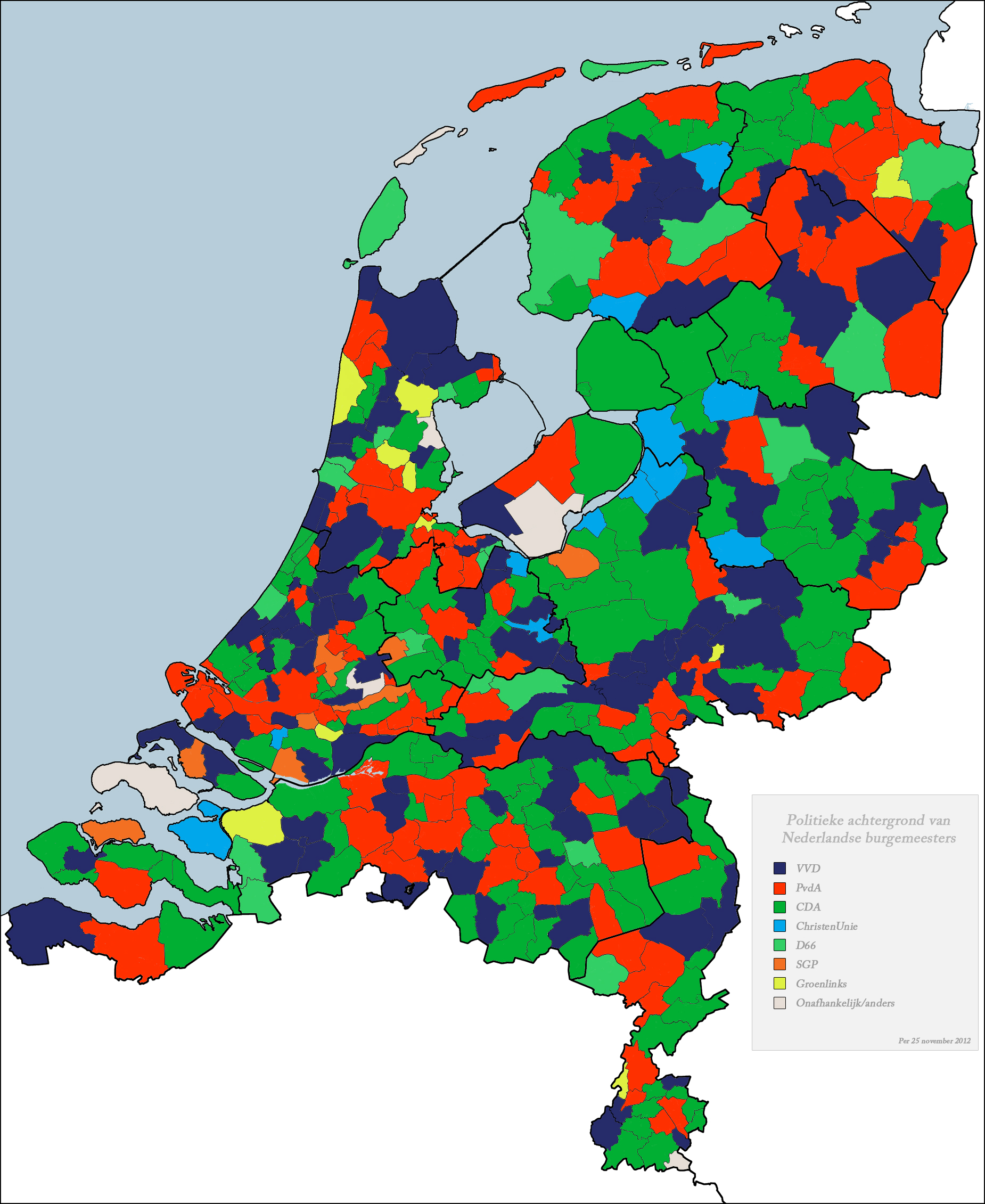 Overzicht van de politieke achtergronden van Nederlandse burgemeester. Gebaseerd op 25 november 2012.